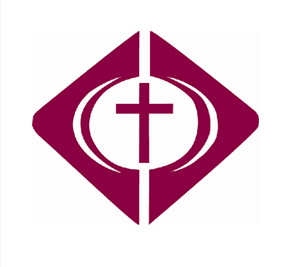 Bread of Life Christian Church Logo